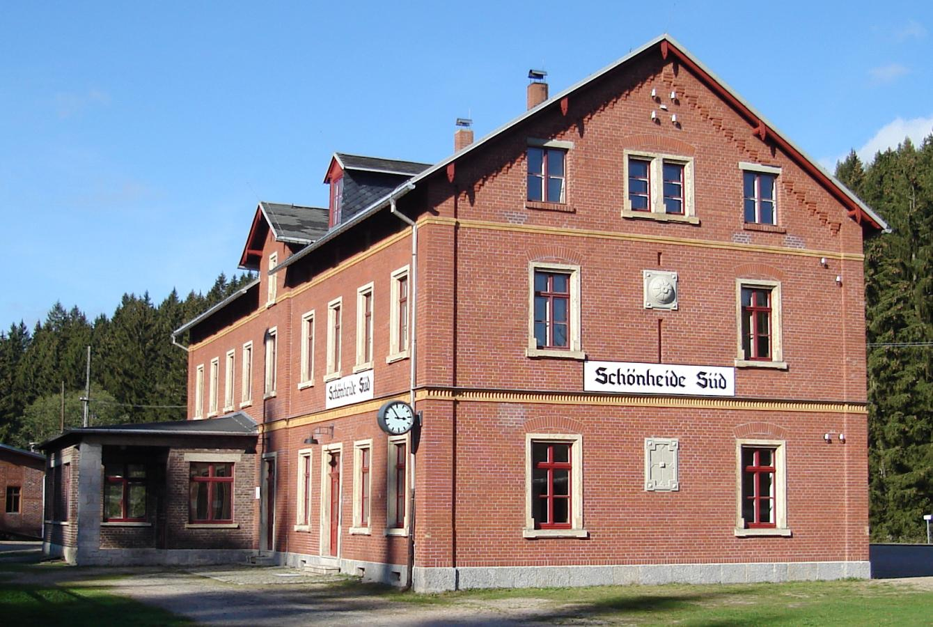 Empfangsgebäude von Schönheide Süd